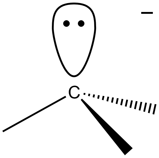 碳负离子